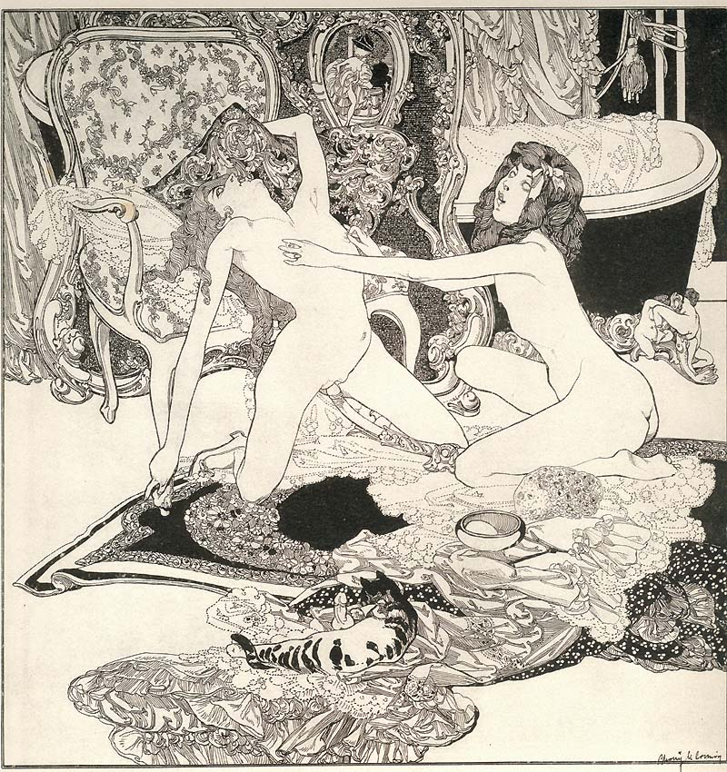 Drawing by Franz von Bayros